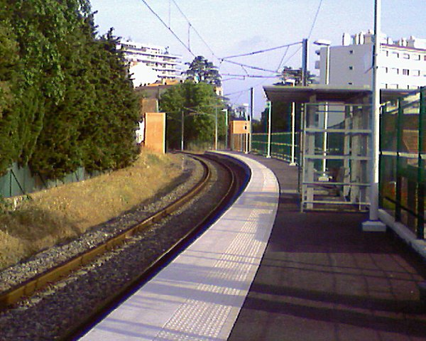 Le Bosquet Station, Cannes.